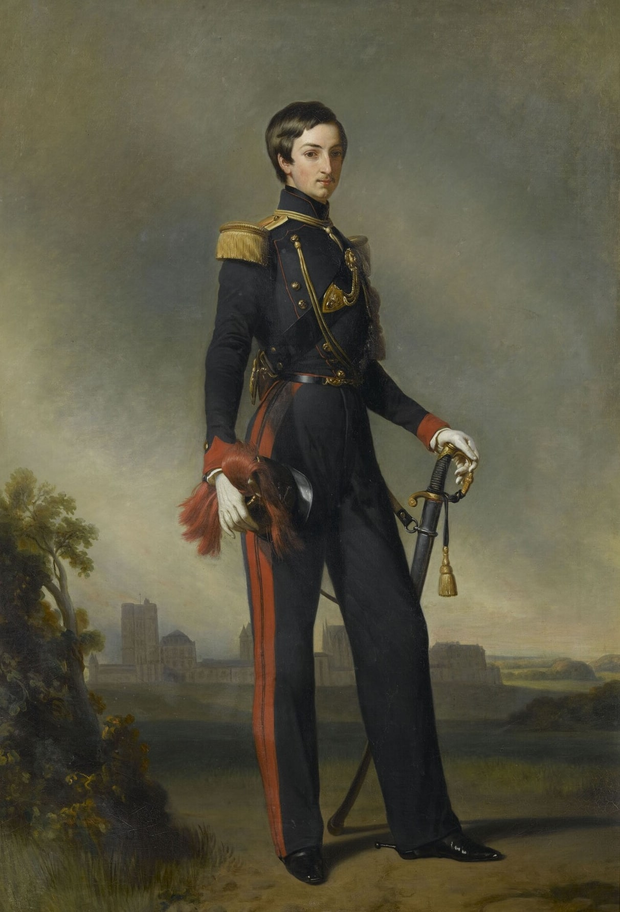 Retrato de Antonio de Orleans, duque de Montpensier e infante de España (1824-1890). Era hijo del rey Luis Felipe I de Francia y de María Amelia de Borbón-Dos Sicilias, y contrajo matrimonio con la infanta Luisa Fernanda de Borbón, hija del rey Fernando VII de España y hermana de la reina Isabel II, que concedió al duque de Montpensier el título de infante de España.